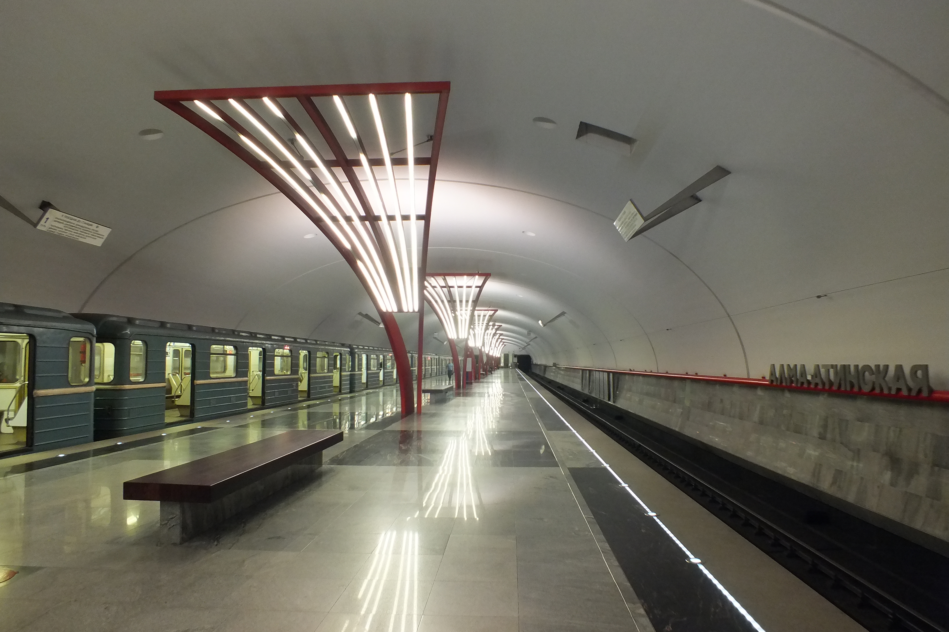 Станция метро «Алма-Атинская», свет от параболических дуг на станции. Съёмка с правой стороны относительно оси расположения дуг.